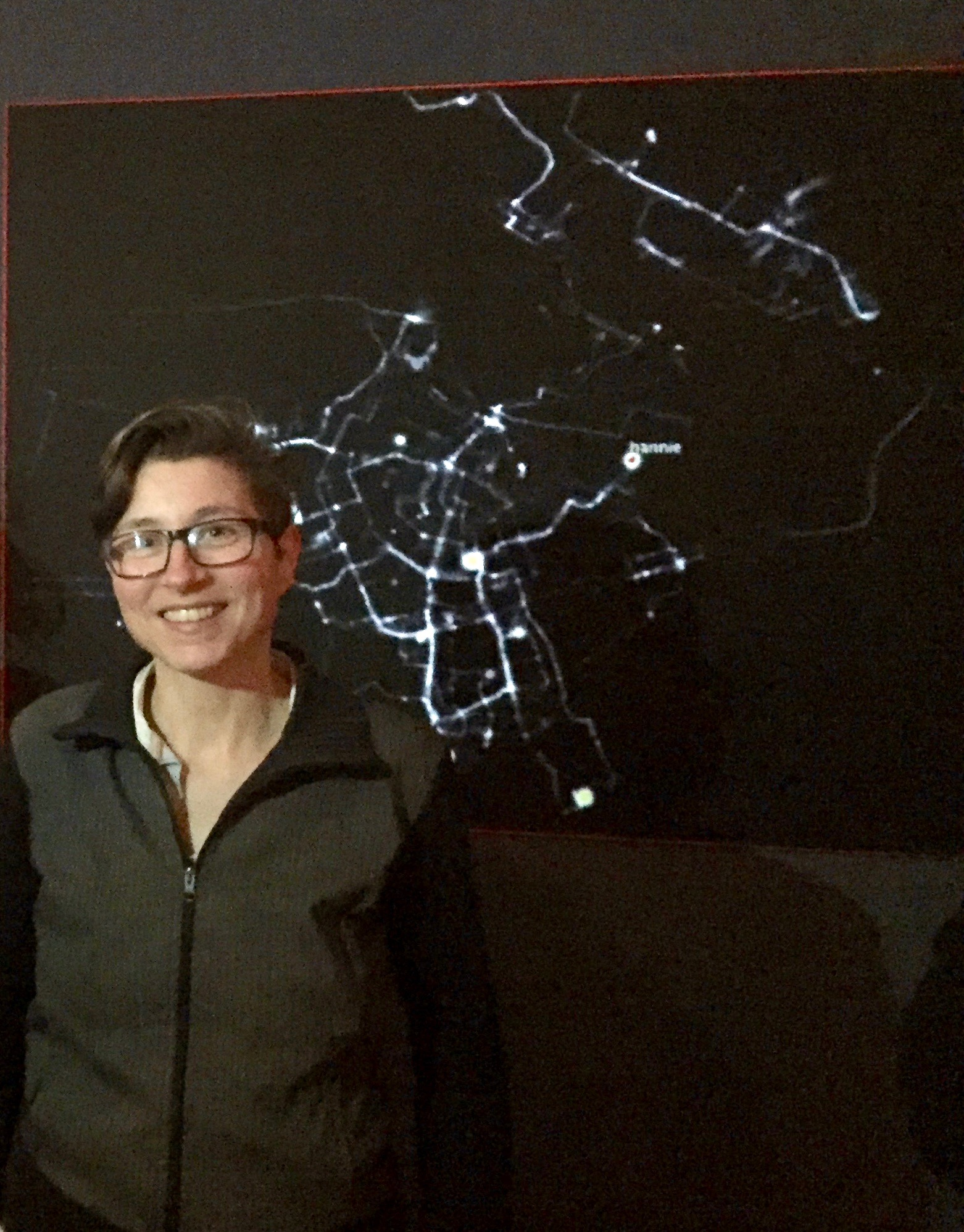 Esther Polak bij het project RealTime tijdens de opening van Made in Amsterdam - 100 jaar in 100 kunstwerken in het Amsterdam Museum